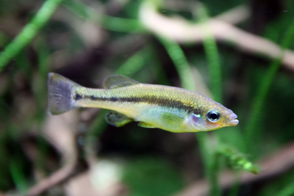 ilyodon xantusi